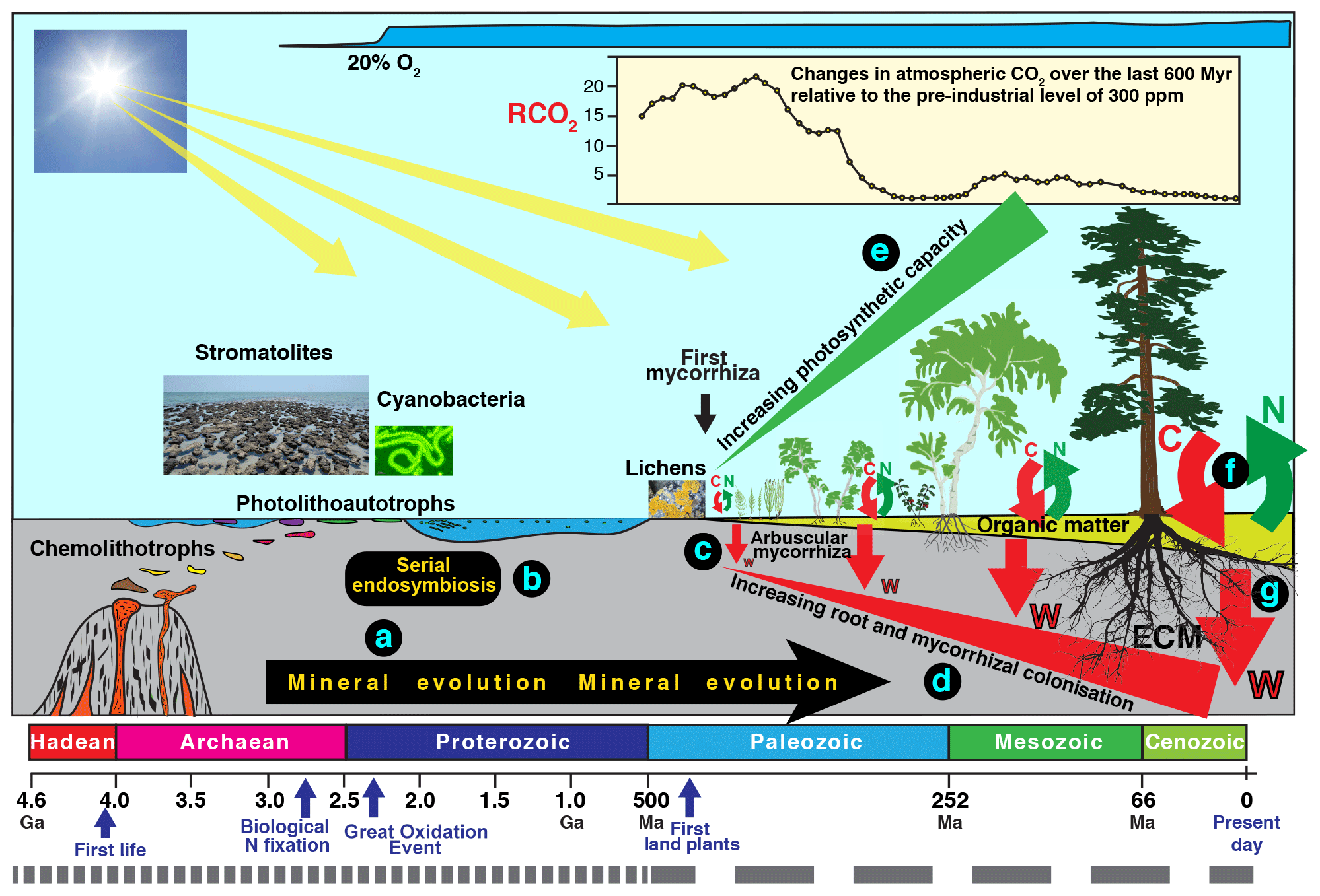 Météorisation biologique causée par les champignons